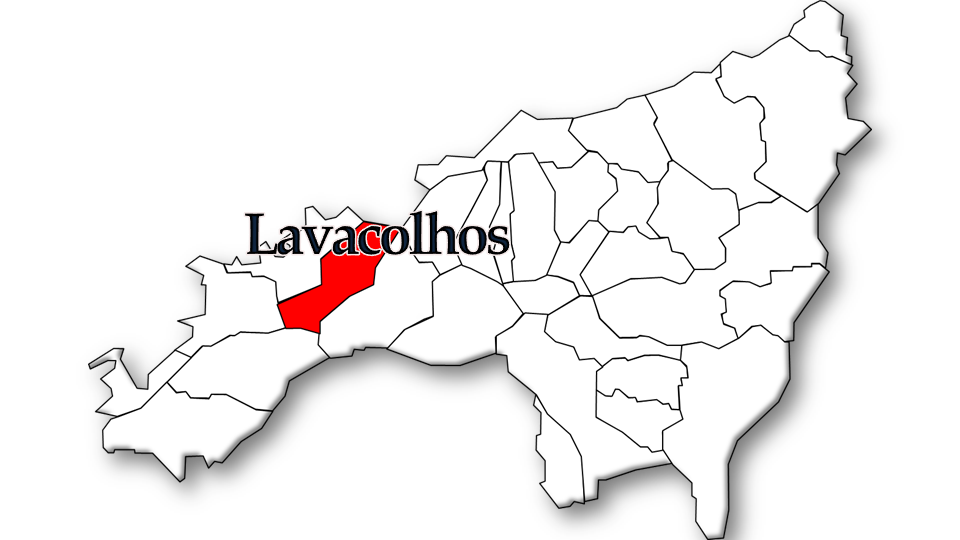 População